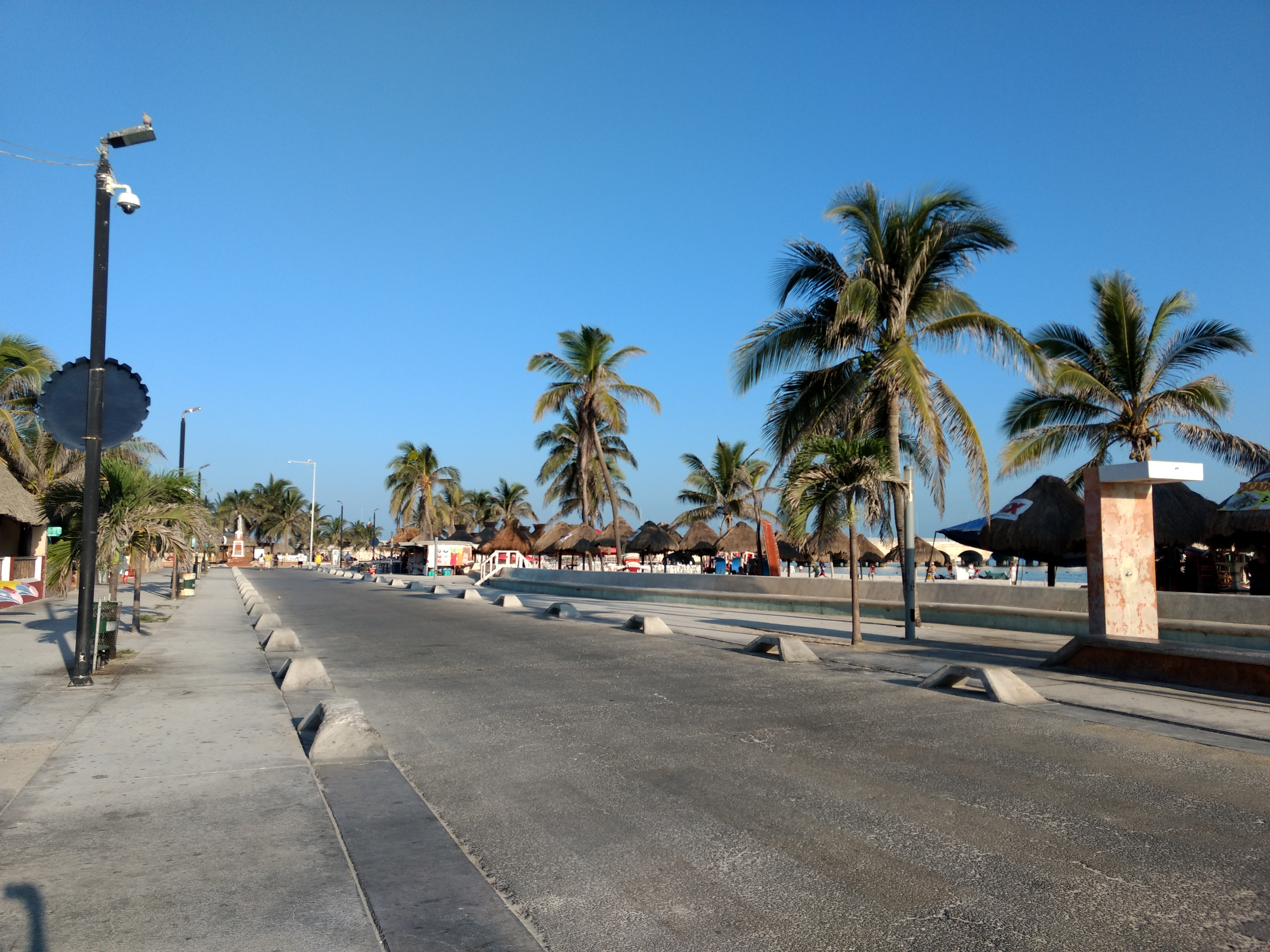 Boulevard internacional Malecón del puerto de Progreso, en el estado mexicano de Yucatán.